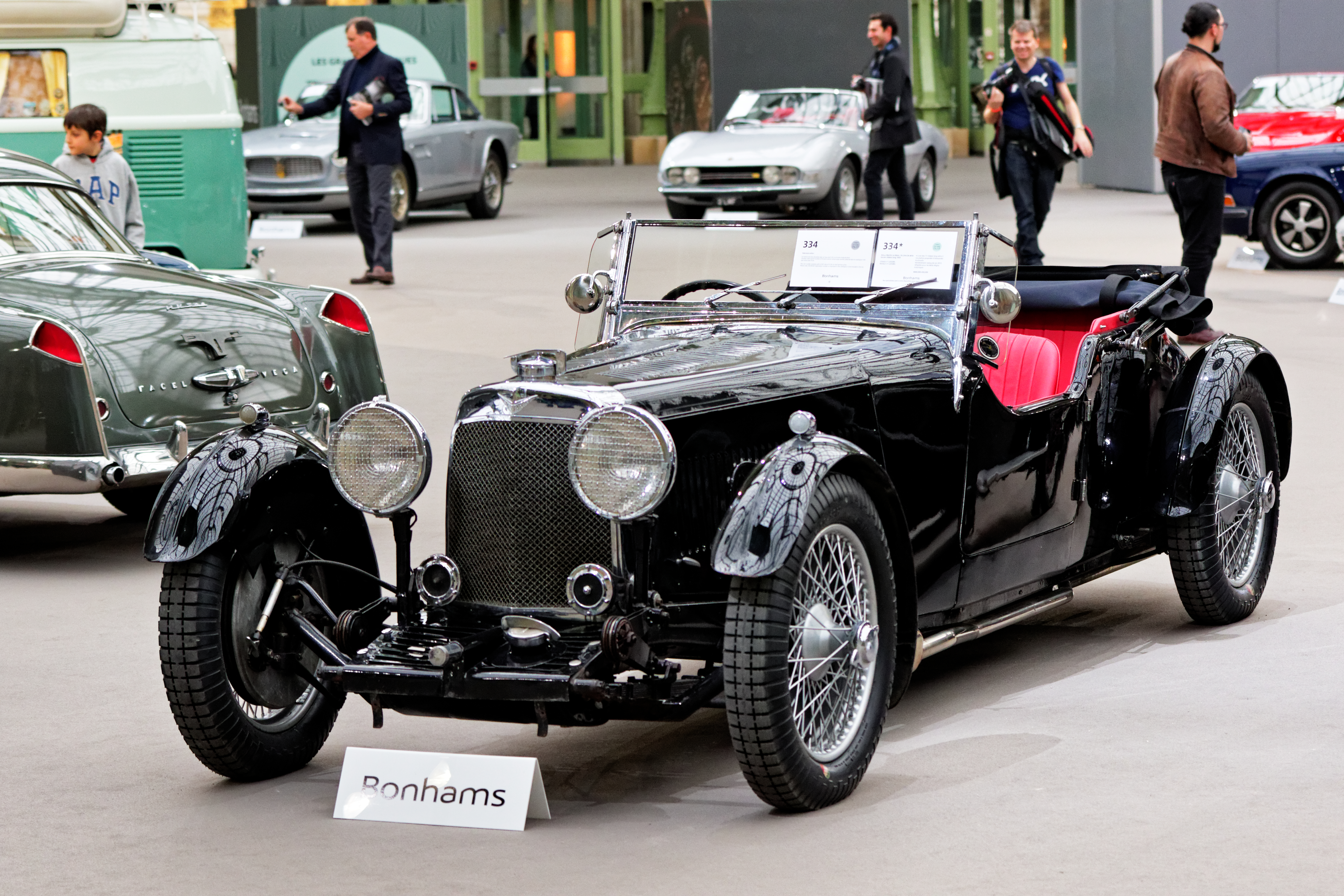 Un des véhicules présenté lors de la vente aux enchères Bonhams 2016 au Grand Palais de Paris.